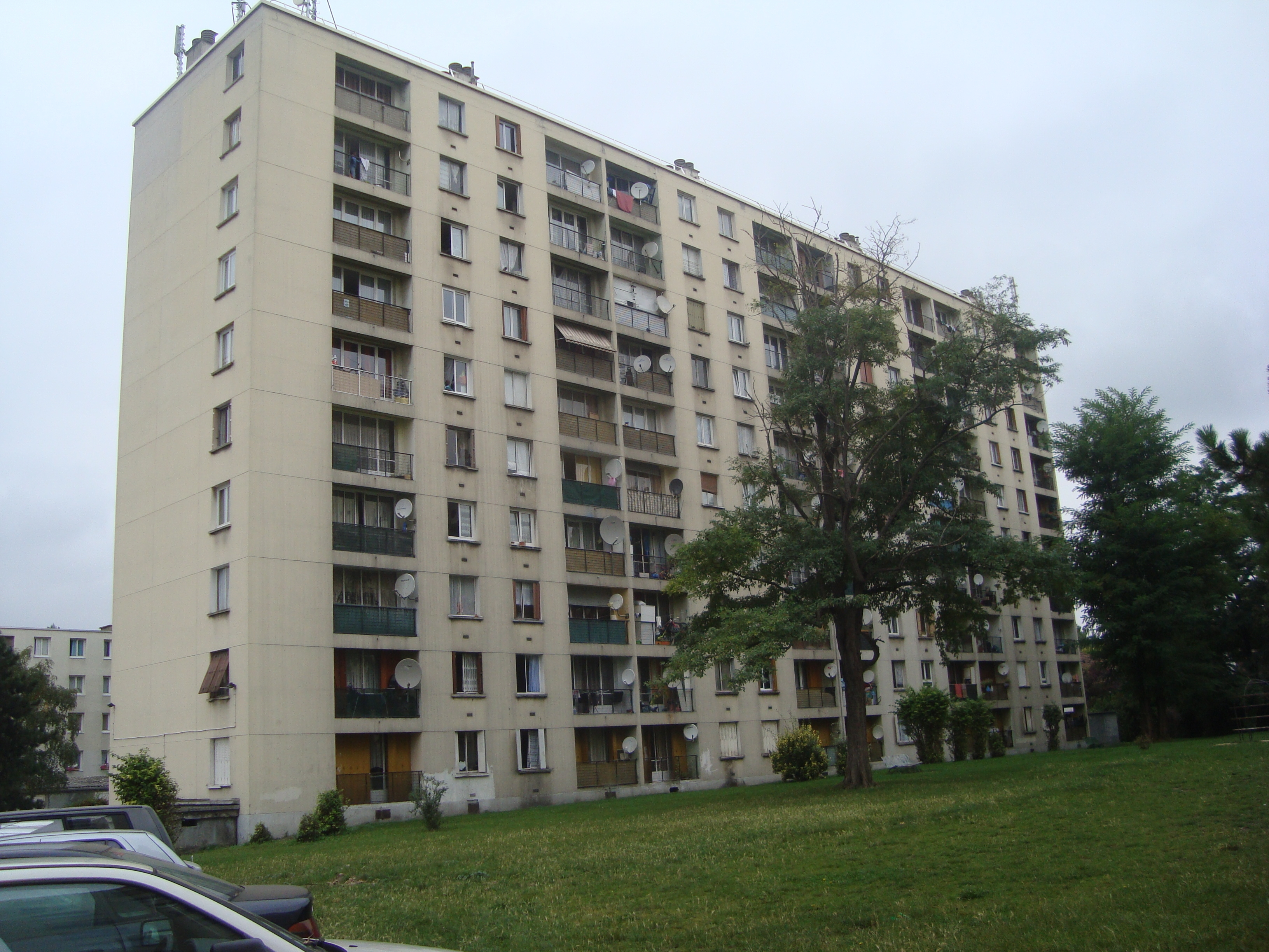 Copropriété de la résidence de la Fontenelle à La Courneuve